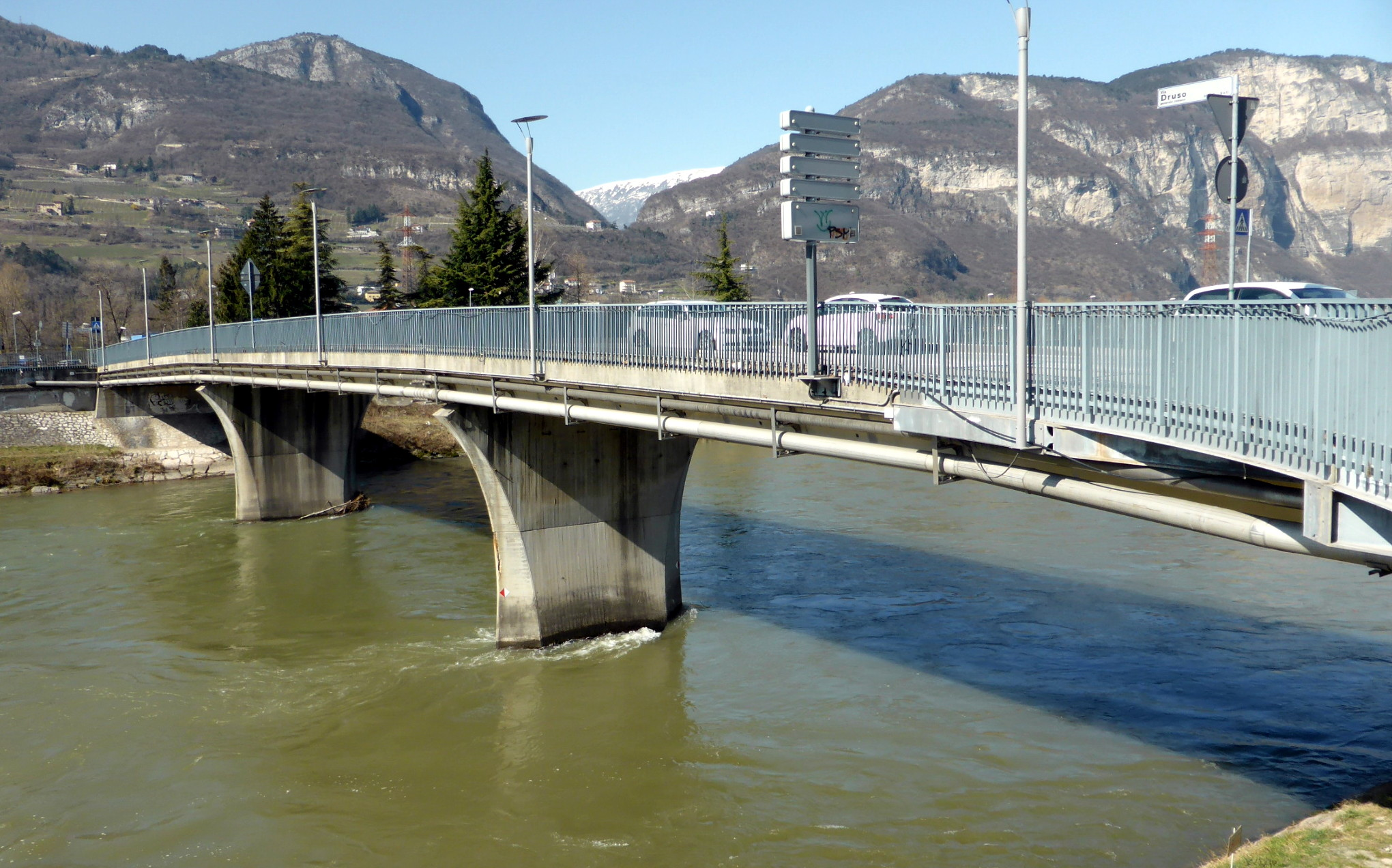 Brücke San Giorgio in Trient.